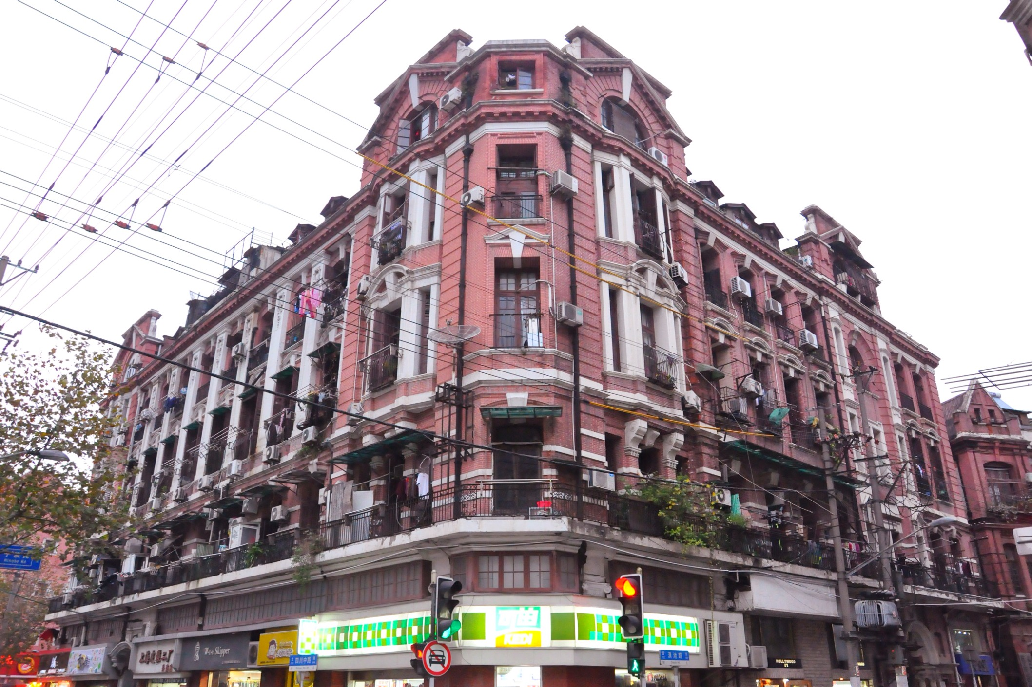 业广地产有限公司 滇池路120号-124号